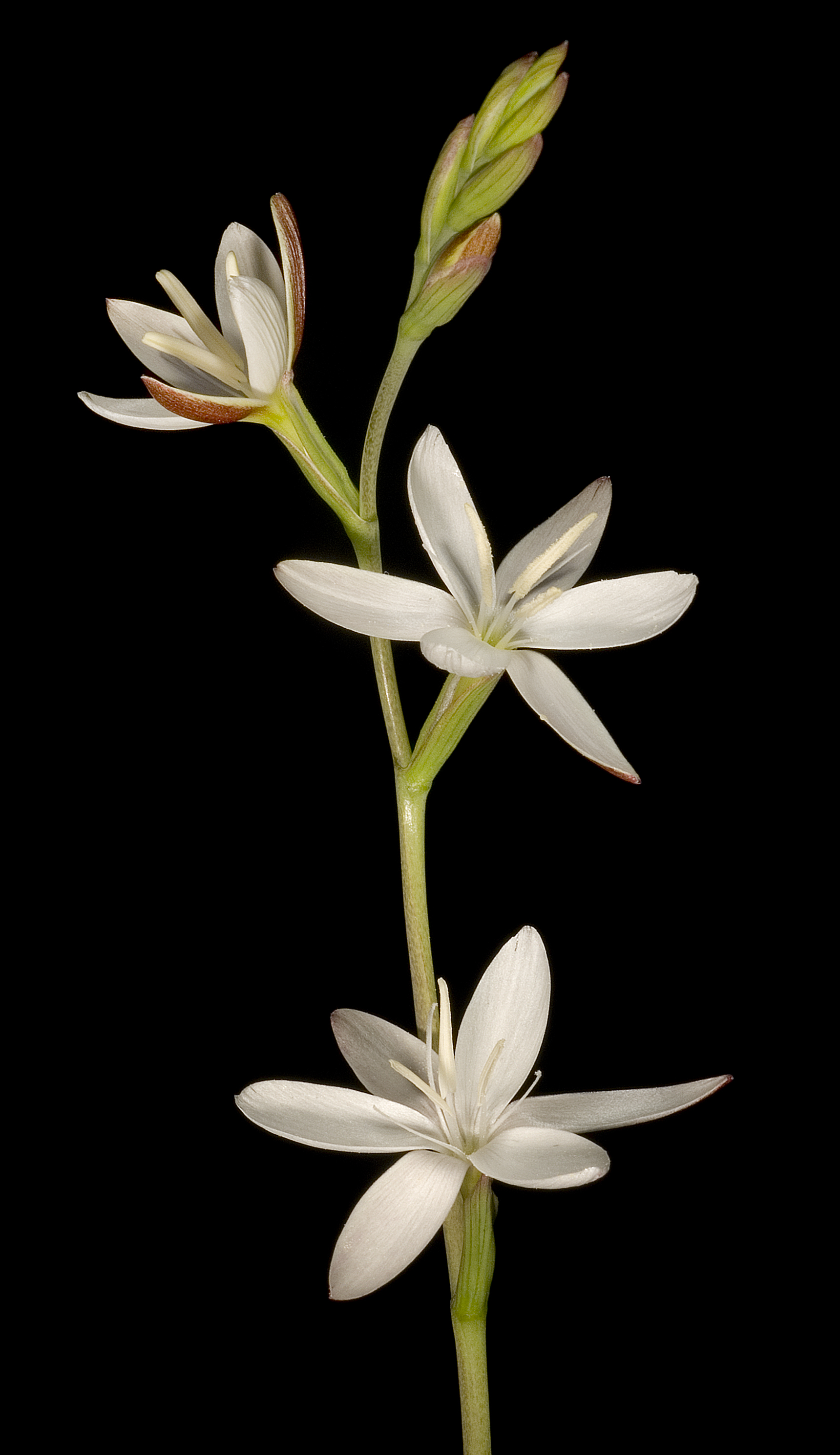 KRT3804